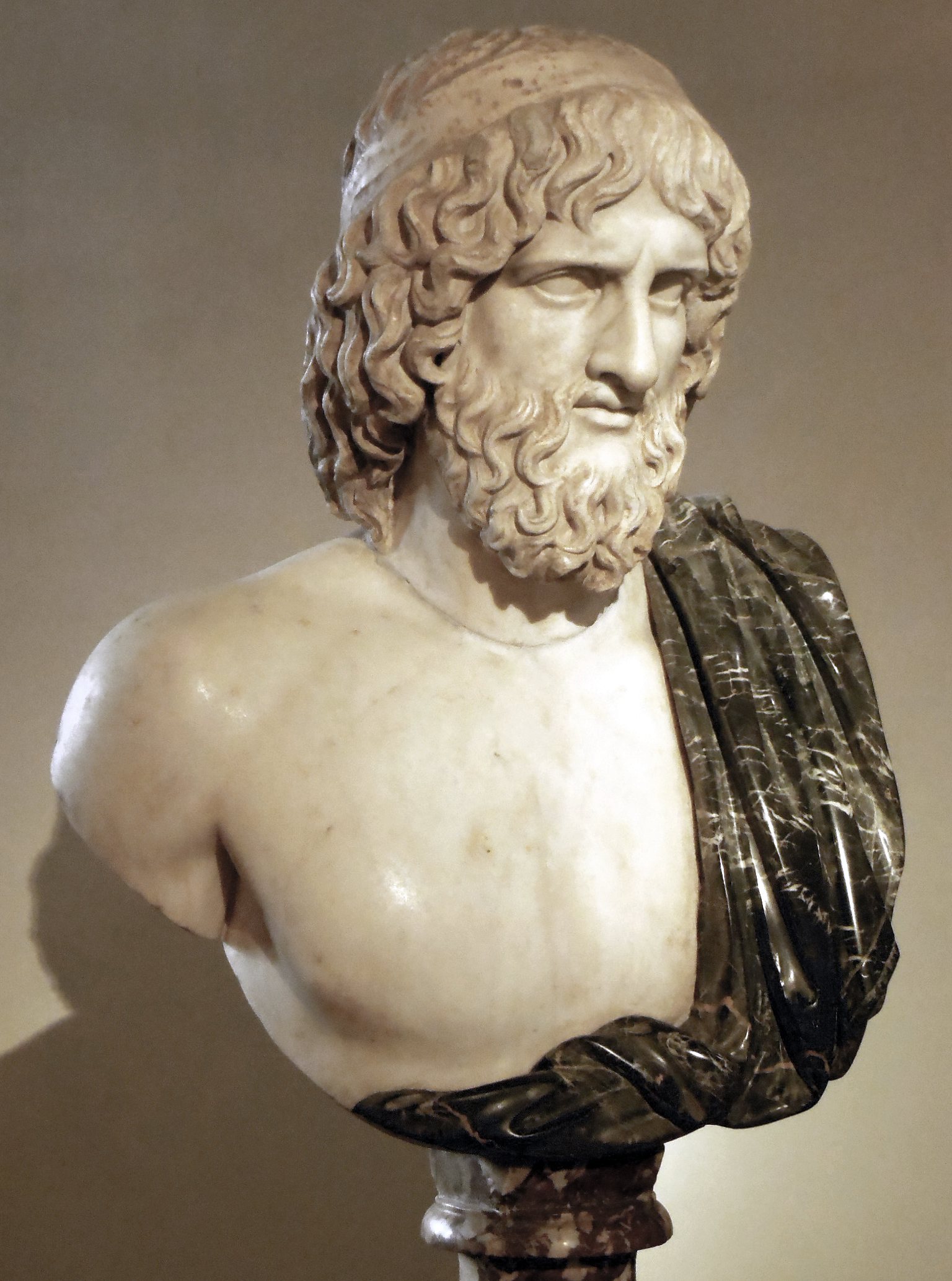 Roma, Museo nazionale romano a palazzo Altemps, busto di Plutone, copia romana da originale greco del V secolo a.C., rilavorata in epoca barocca (con l'aggiunta anhe del mantello in marmo nero).